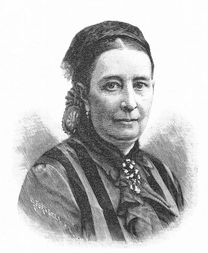 Augusta Björkenstam (1829-1892)